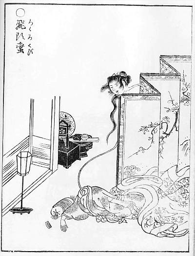 Rokurokubi (飛頭蛮) from the Gazu Hyakki Yakō